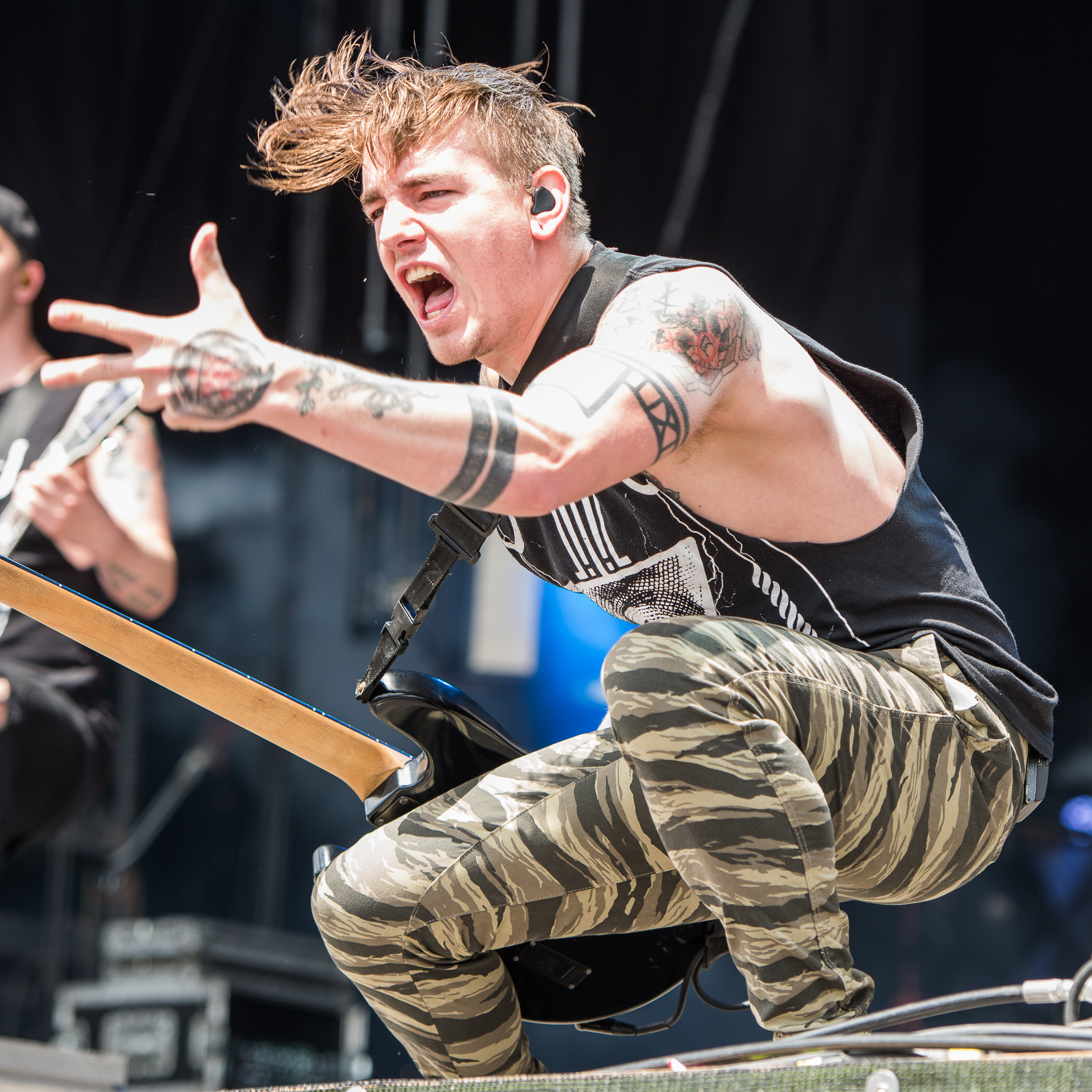 ARGO-Konzerte,Andrew Glass,Festival,Konzert,Livekonzert,Livemusik,Musik,RiP,Rock im Park 2016,Seat Zeppelin Stage,We Came As Romans